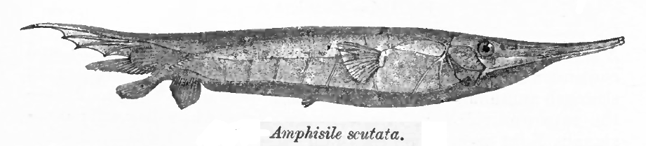 Amphisile scutata = Centriscus scutatus Linnaeus, 1758